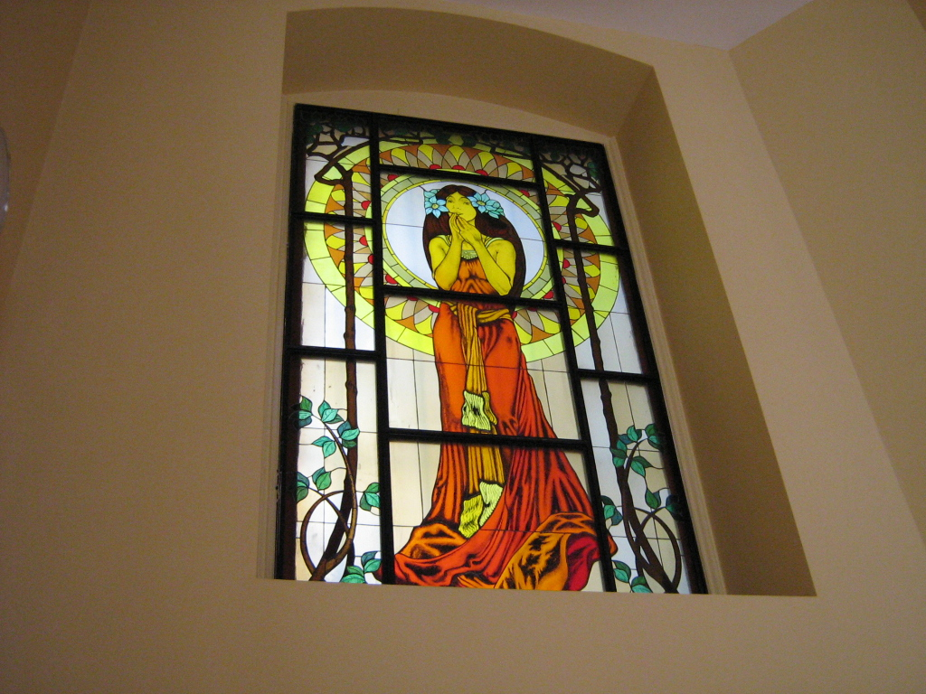 Kamienica Alojzego Balle - witraż (Łódź)